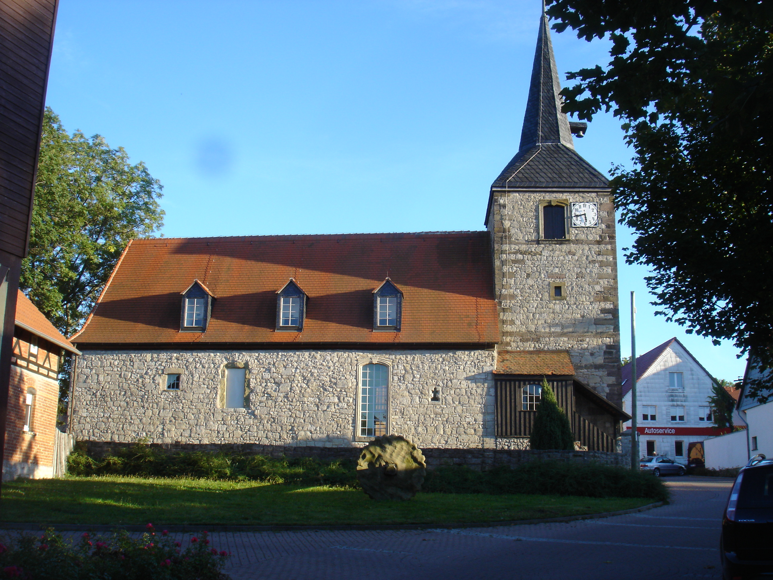 Kirche